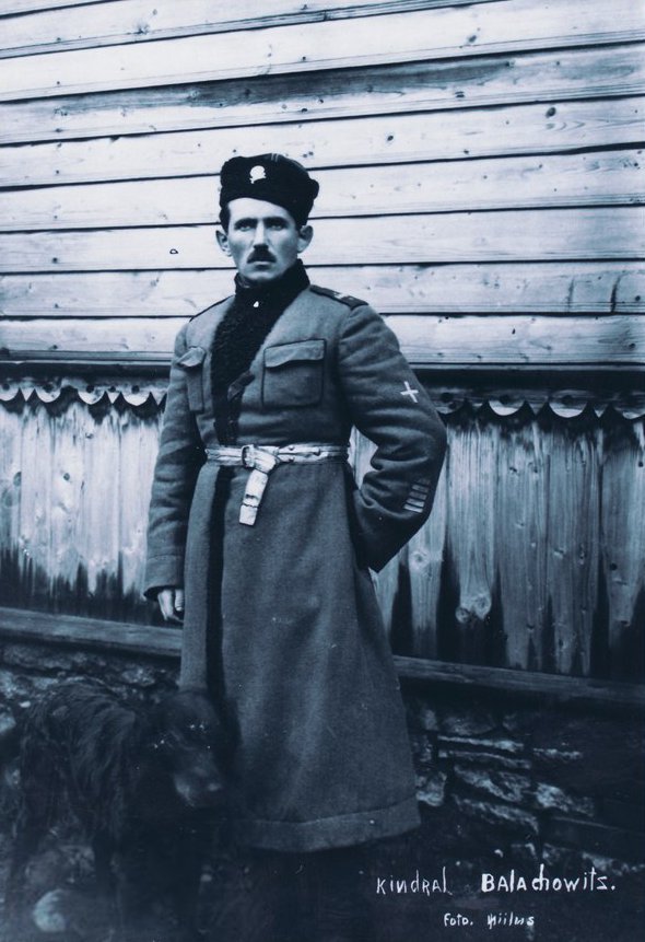 Беларуская (тарашкевіца): Станіслаў Булак-Балаховіч са сваім сабакам Райтам, кастрычнік-лістапад 1919 году.